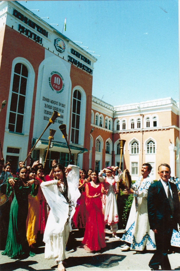 Студенческий ансамбль Таджикского национального университета, Таджикистан